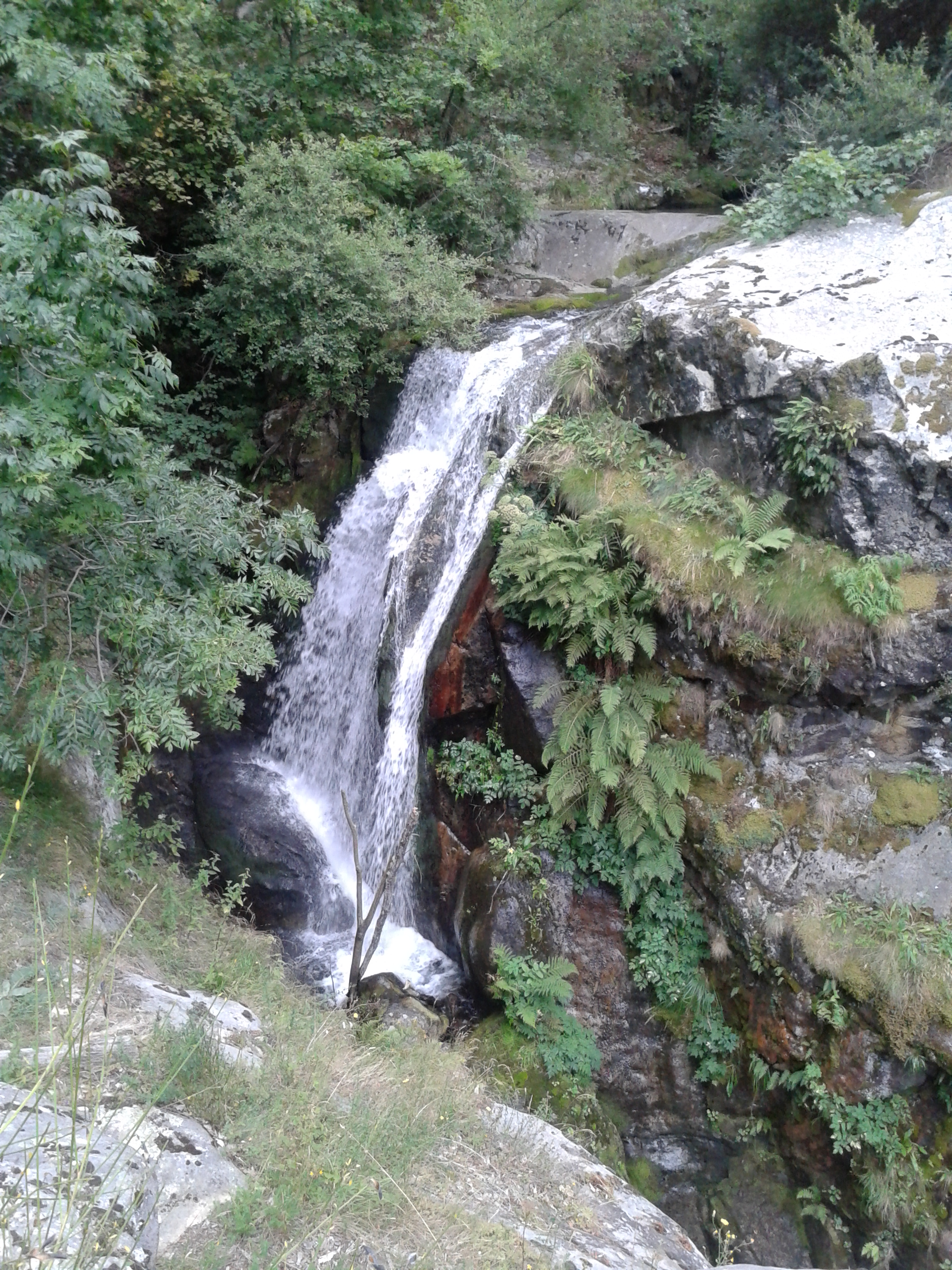 Cascades del riu Cadí, al Conflent